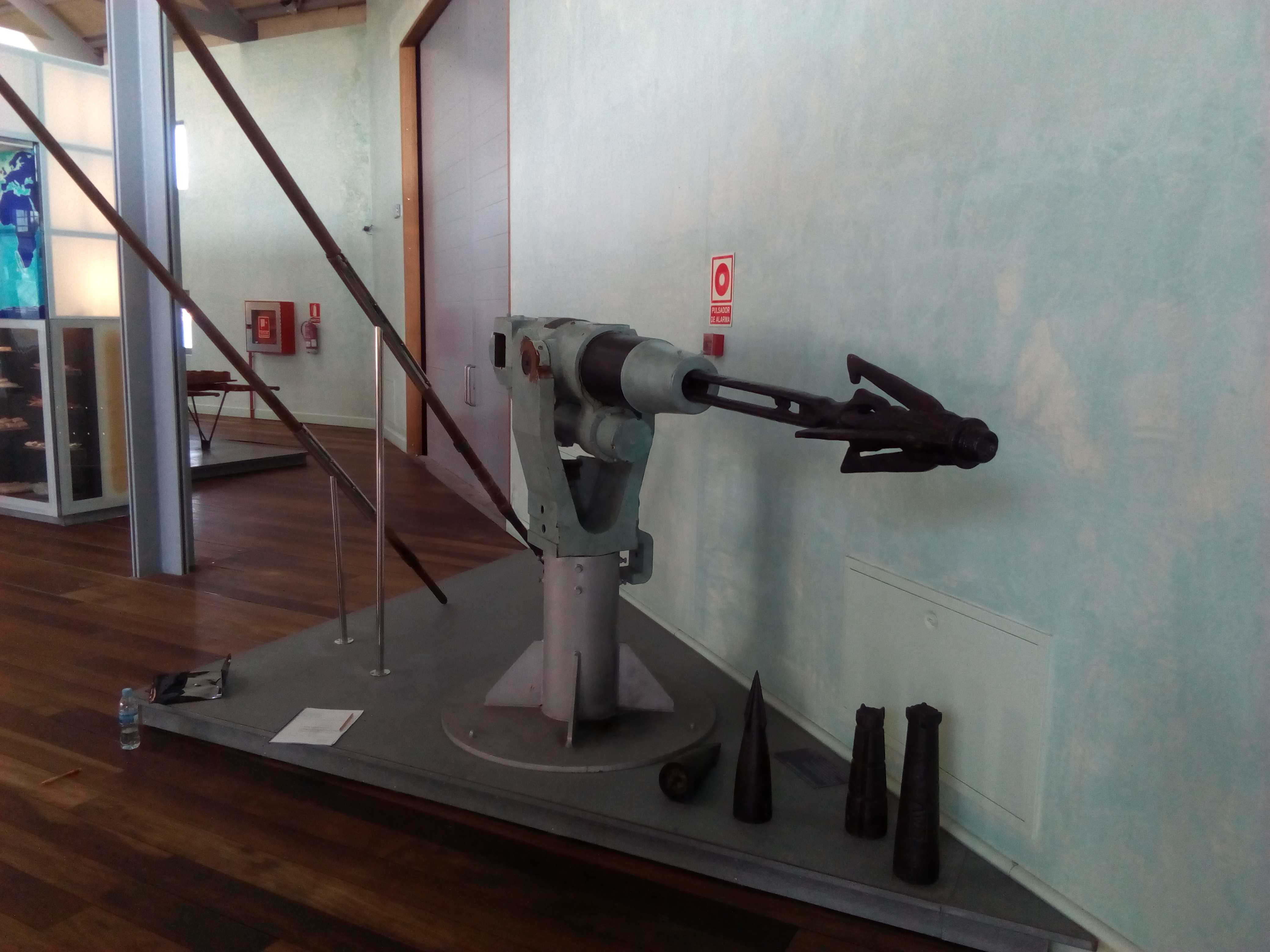 arpón caza de ballenas en el museo del mar